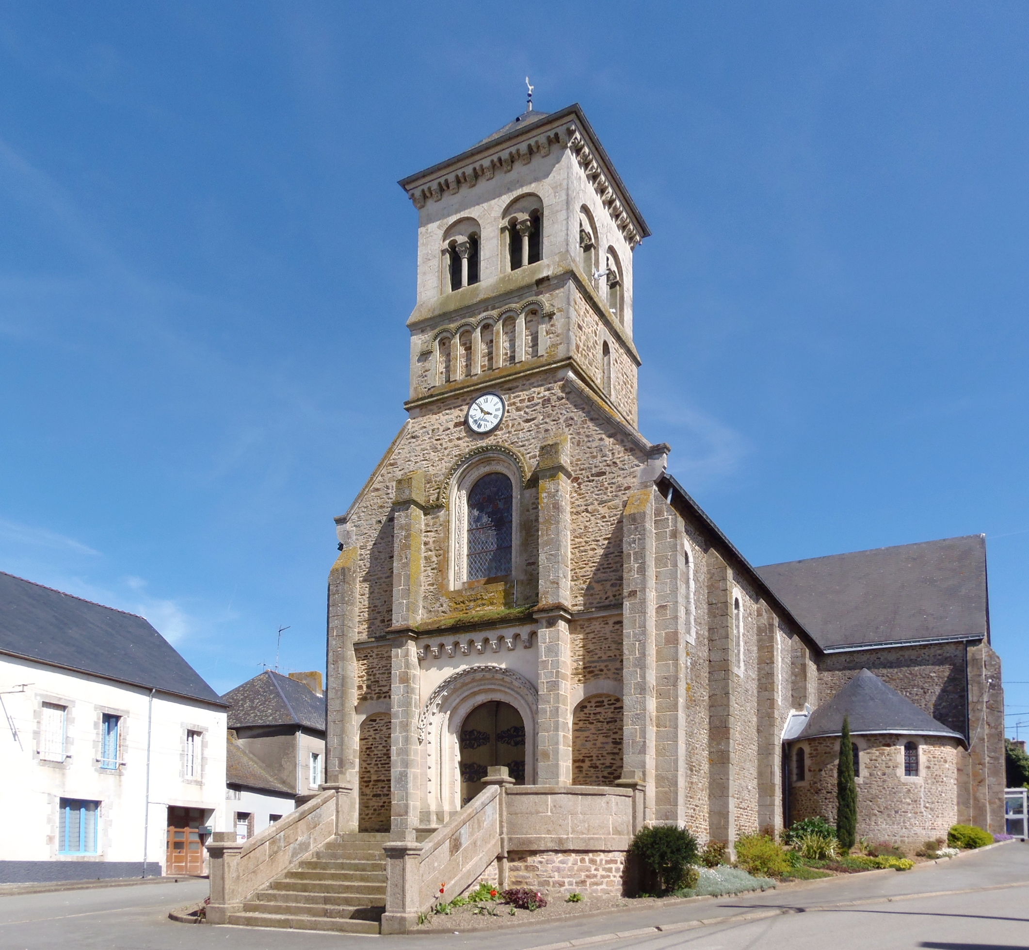 Saint-Aubin-du-Désert (Pays de la Loire, France). L'église Saint-Aubin.